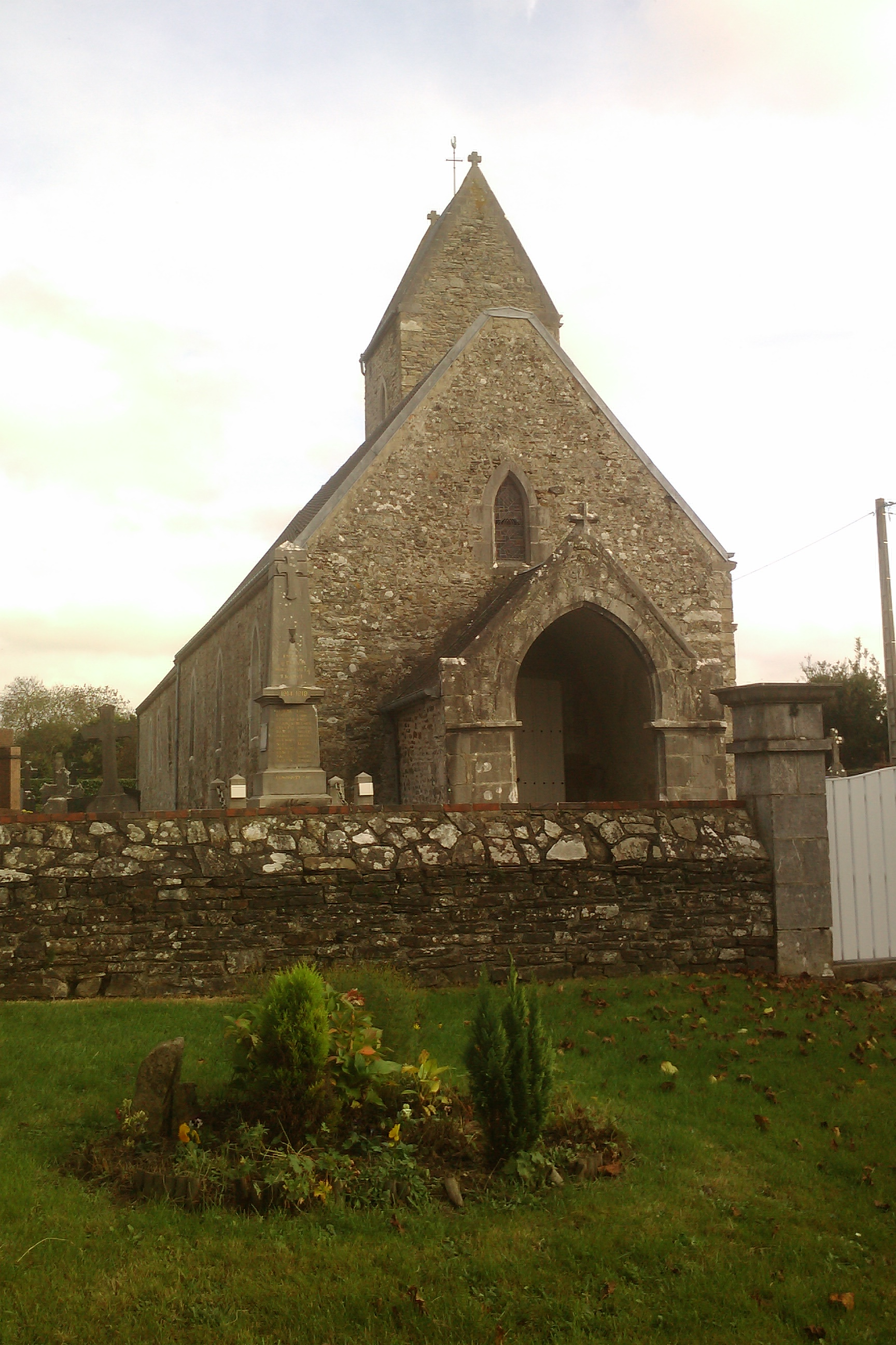 église Saint-Martin de Belval (Manche)